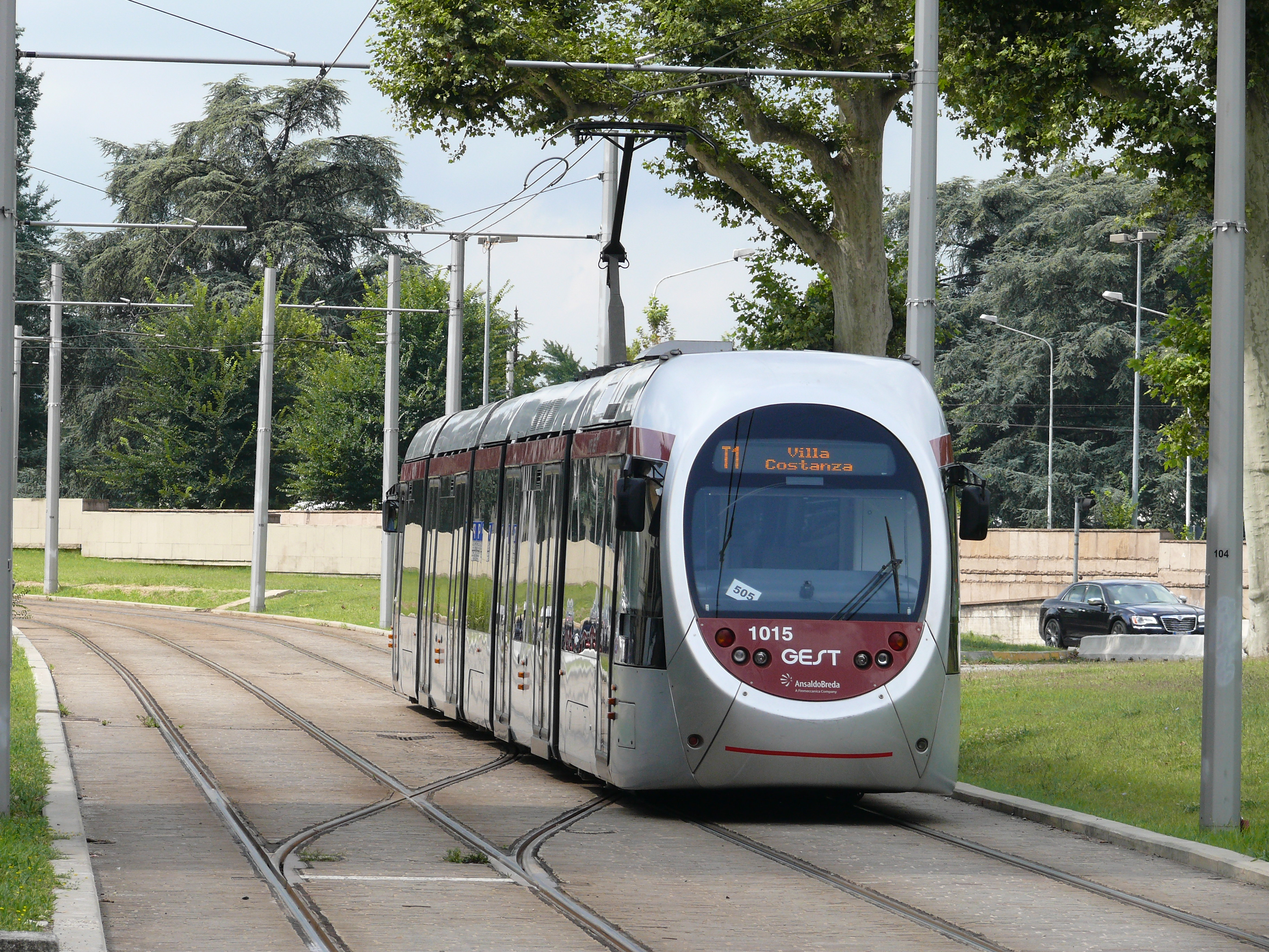 Ausfahrt einer Straßenbahn vom Typ "Sirio" (AnsaldoBreda), an der Haltestelle "Porta Al Prato - Leopolda" in Florenz.